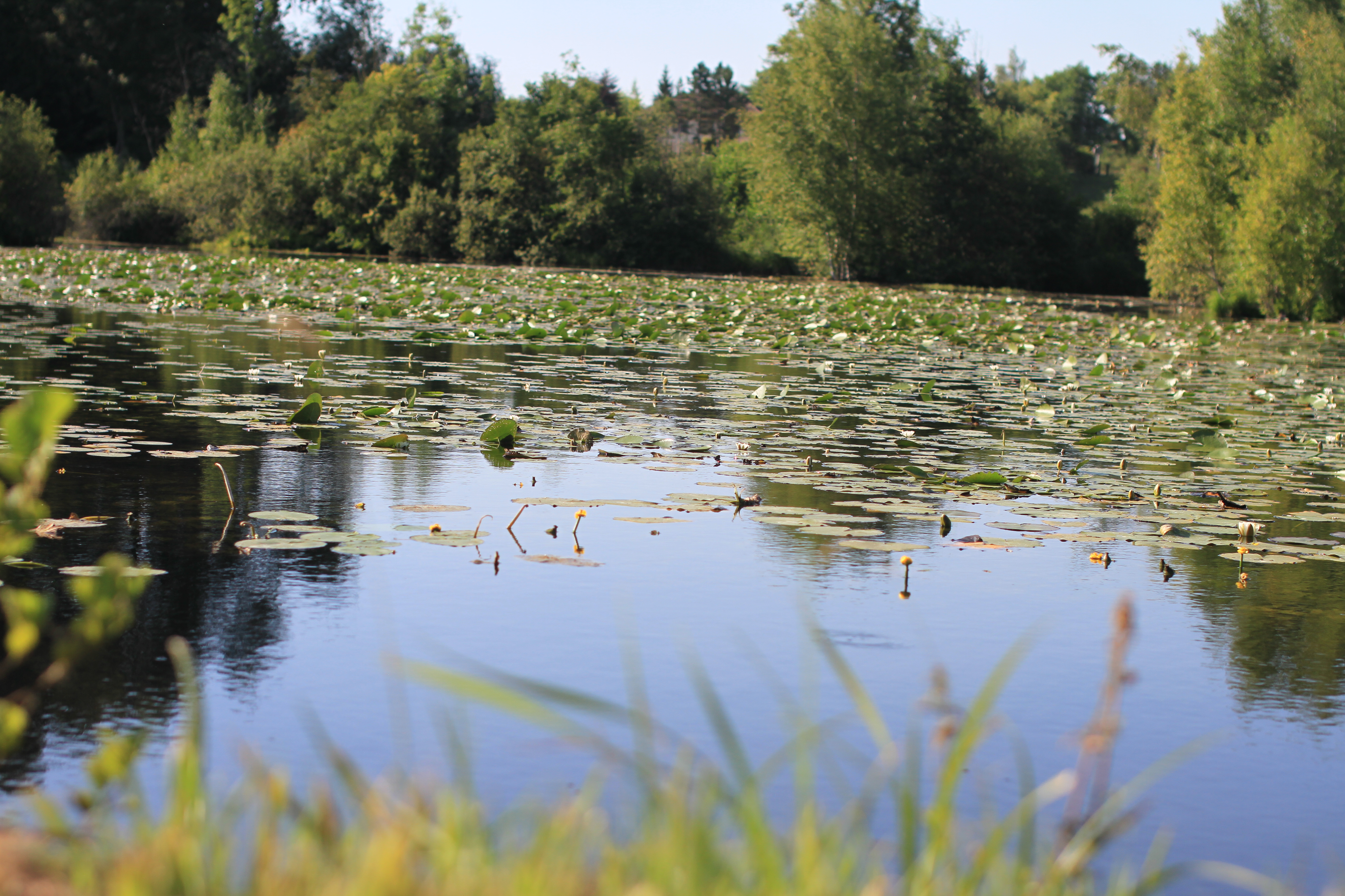 Etangs de Hailles - Thezy Glimont